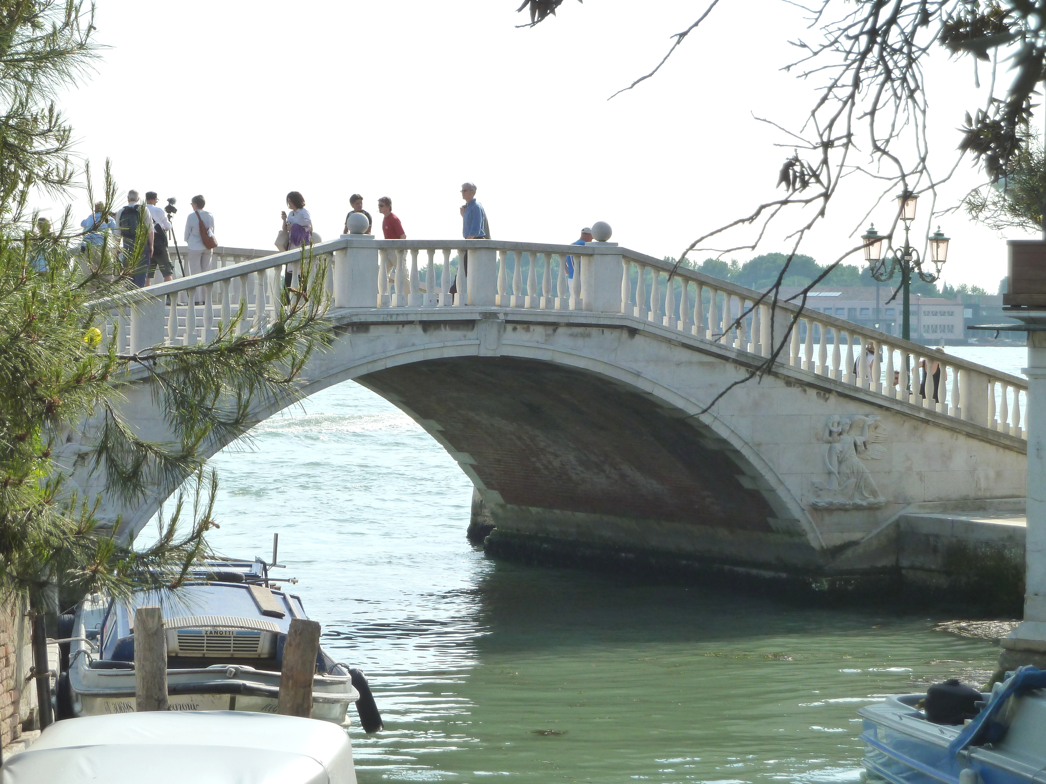 Ponte dei Sette Martiri (Venice)